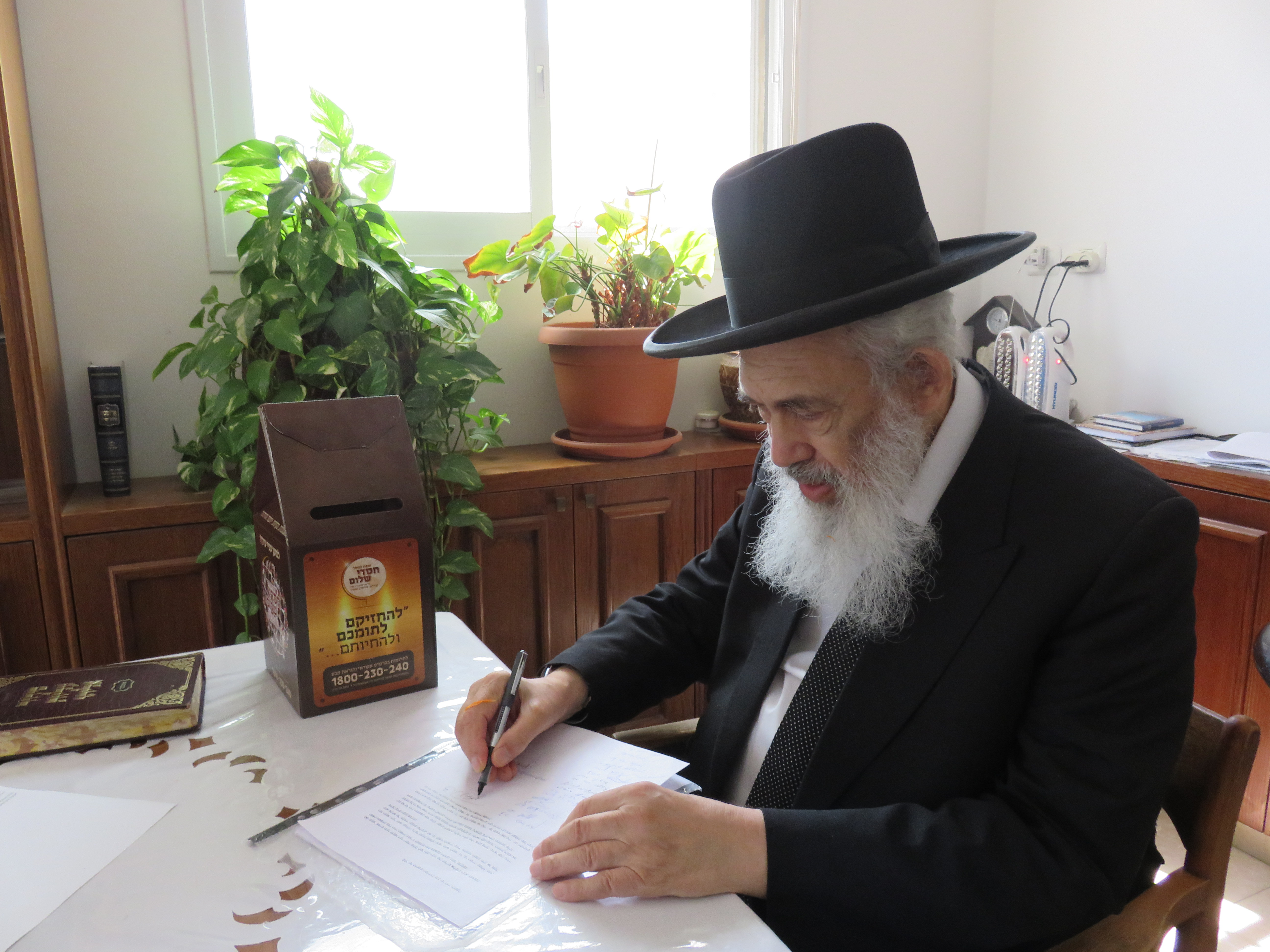 חותם על קיראת קודש למען קופת הצדקה חסדי שלום